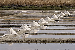 Les marais salants - Île de Ré Photo issue de ma banque d'images personnelle : Pep.per